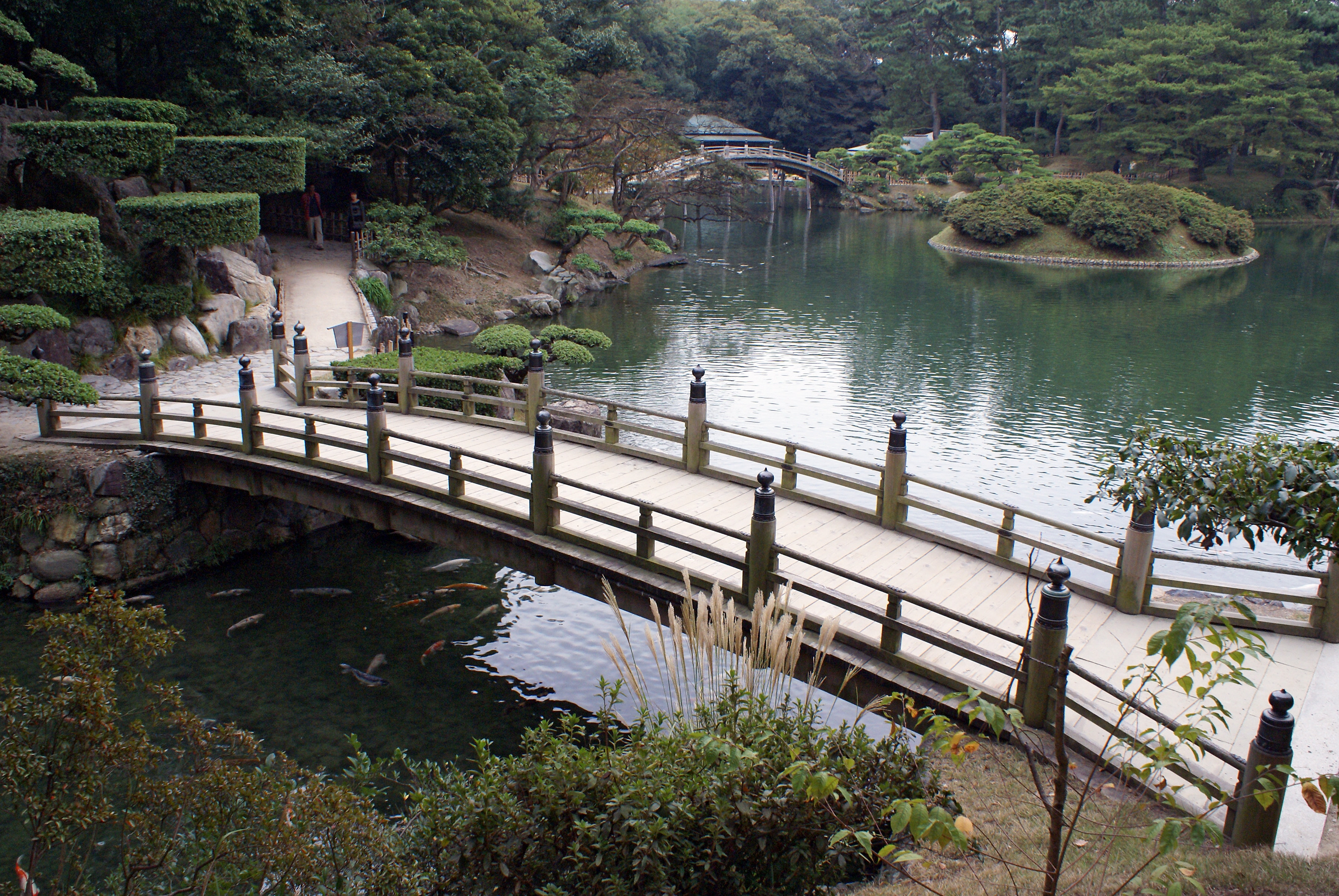 Ritsurin Garden in Takamatsu, Kagawa Prefecture, Japan